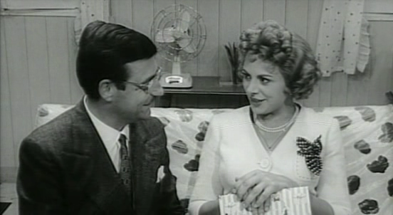 Fotogramma dal film di Antonio Pietrangeli La visita (1963) Catturato da Pakdooik